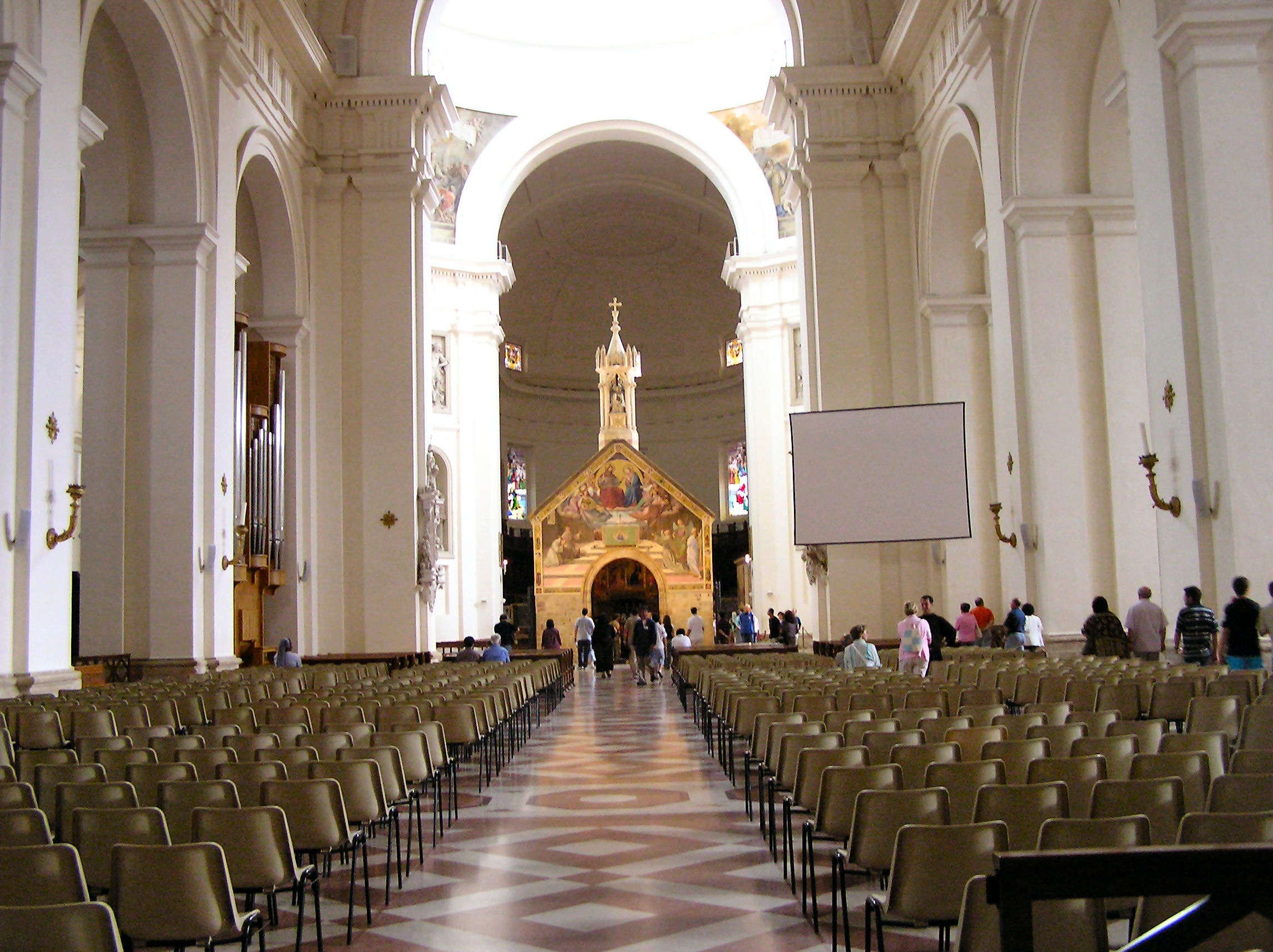 La Porziuncola all'interno di Santa Maria degli Angeli, ad Assisi.